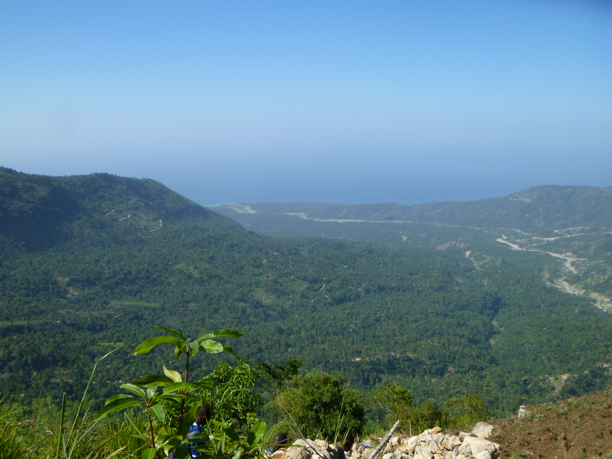 Paysage vert, Marigot